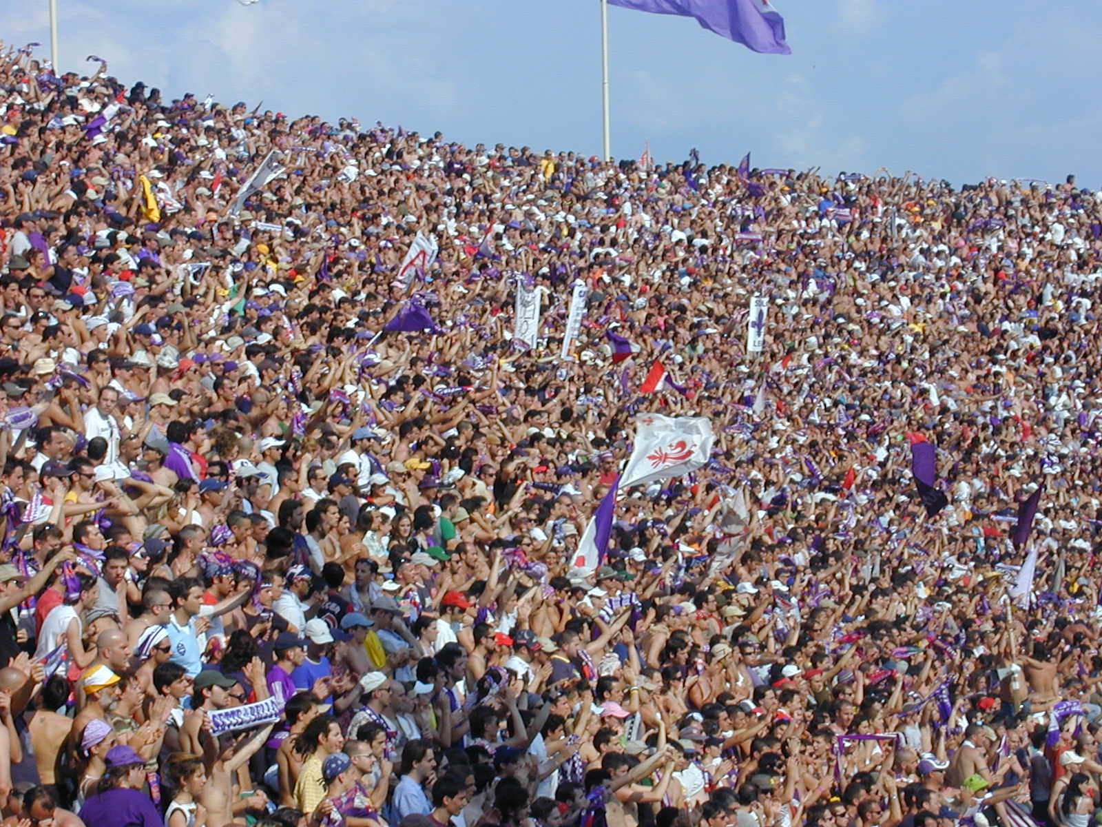 stadio fiorentina firenze